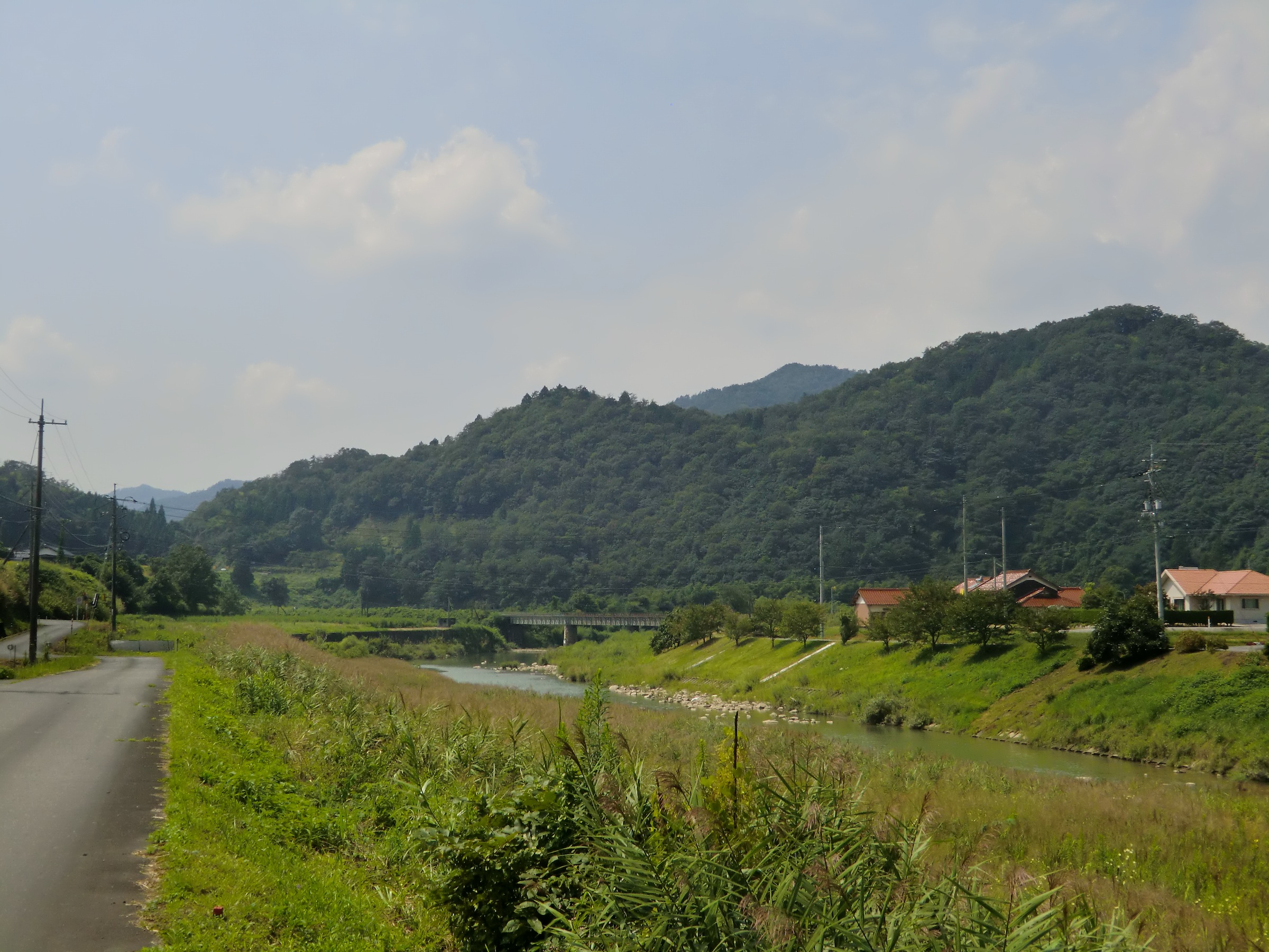 長門国渡川城跡の全景（山口市）